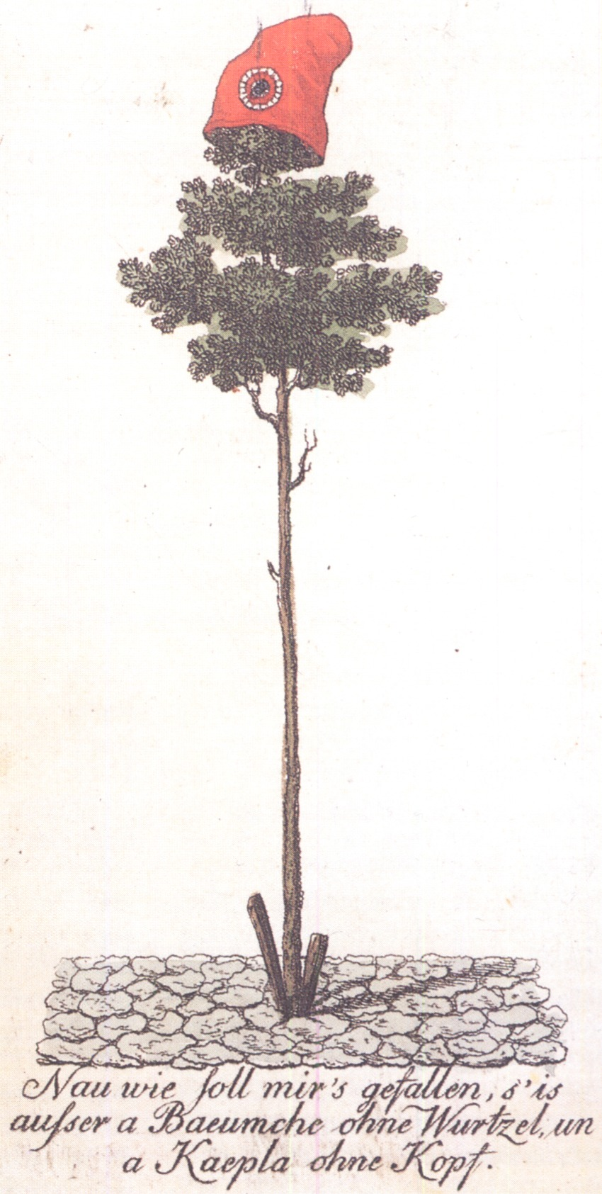 "Nau will soll mir's gefallen, s'is außer a Baeumche ohne Wurtzel, un a Kaepla ohne Kopf." Der 1. Mainzer Freiheitsbaums, kolorierter anonymer Kupferstich, 1793, 13,8×8 cm, In: Johann Jakob Ihlée, Tagebuch von der Einnahme Frankfurts durch die Neufranken bis zur Wiedereroberung von der kombinierten Armee. Denkmal deutscher Treue, o.O. 1793